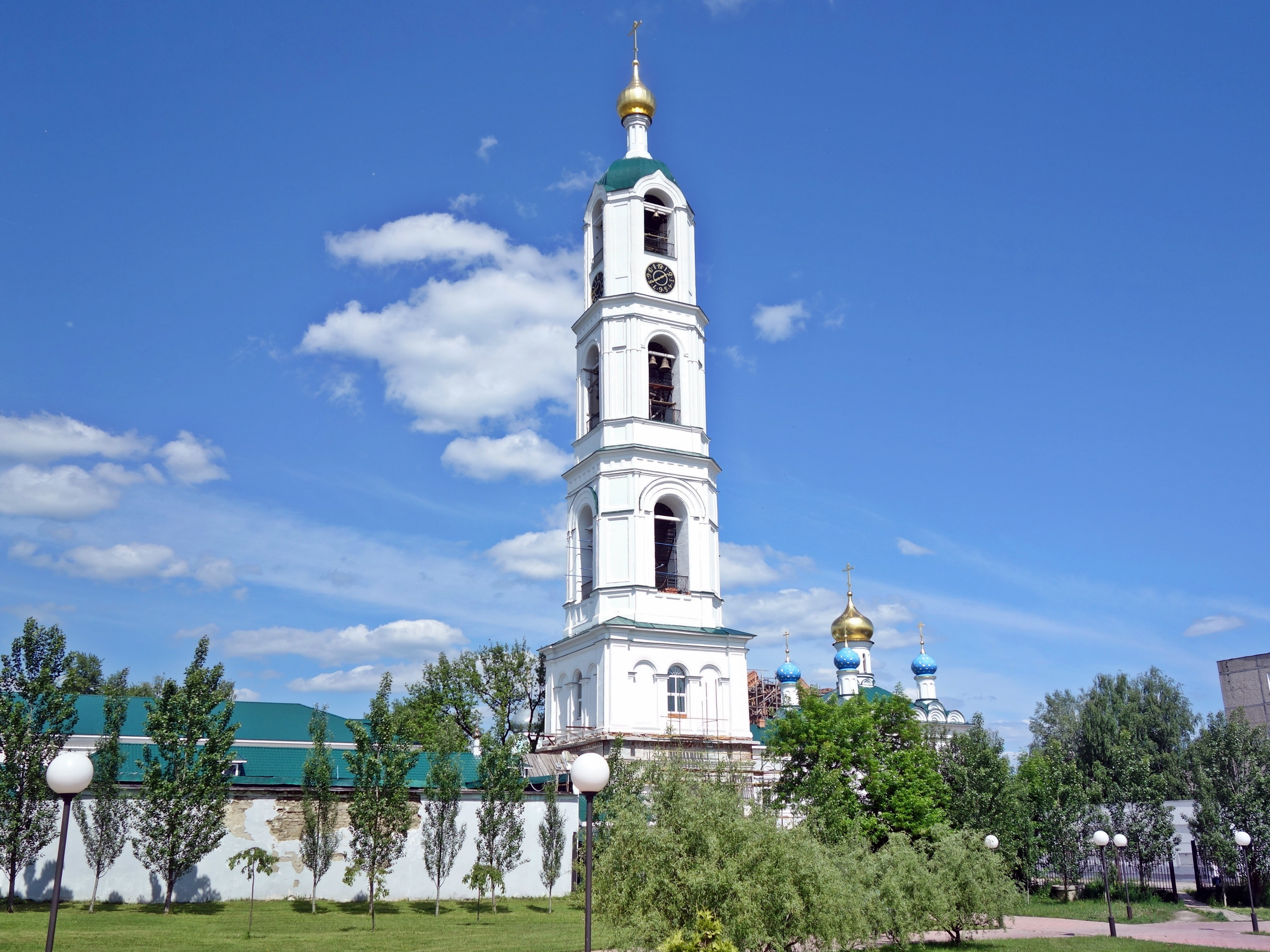 колокольня: улица Краснофлотская, 58, Выкса, Выксунский район, Нижегородская область